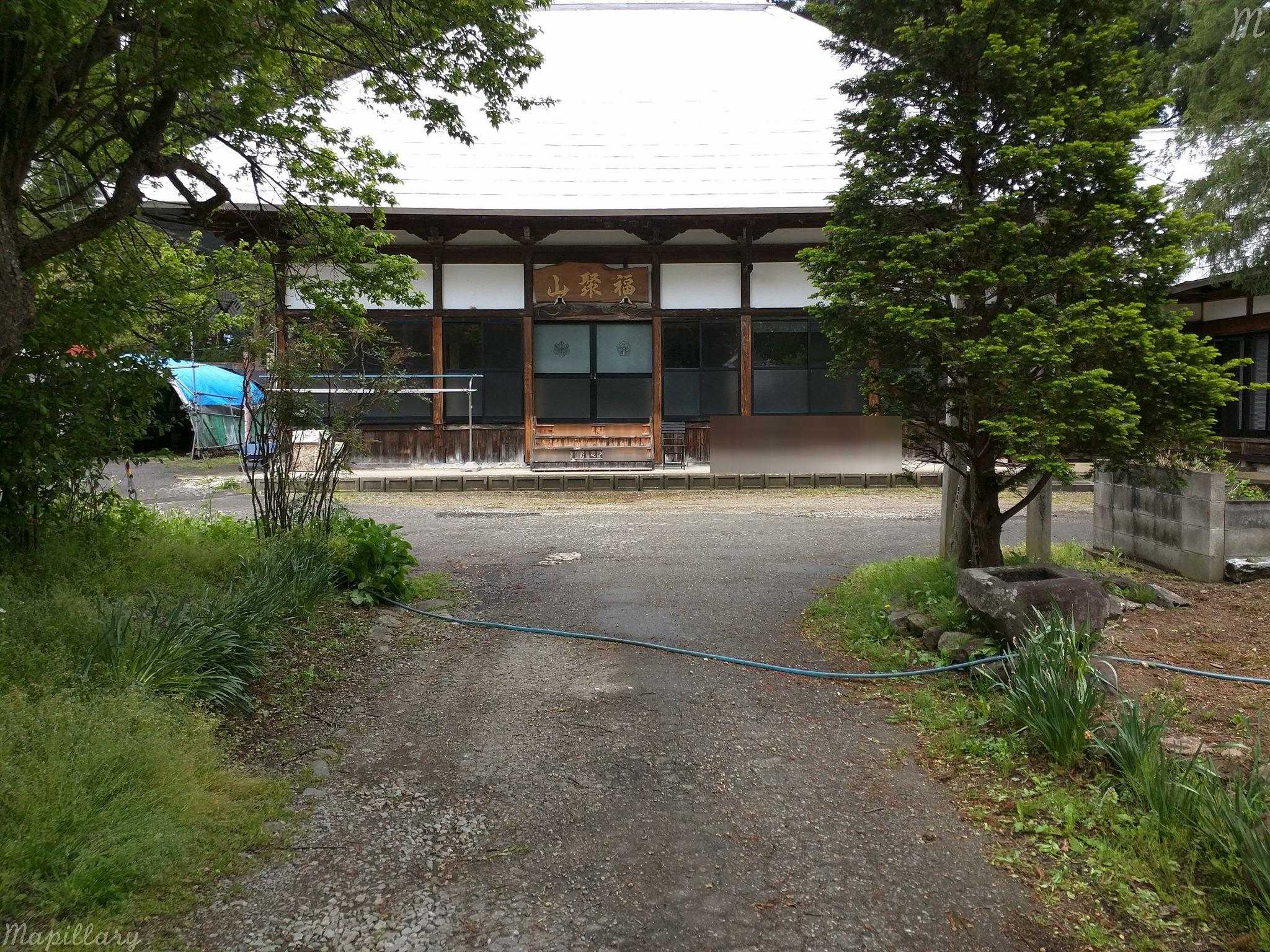 福聚山大光寺本堂